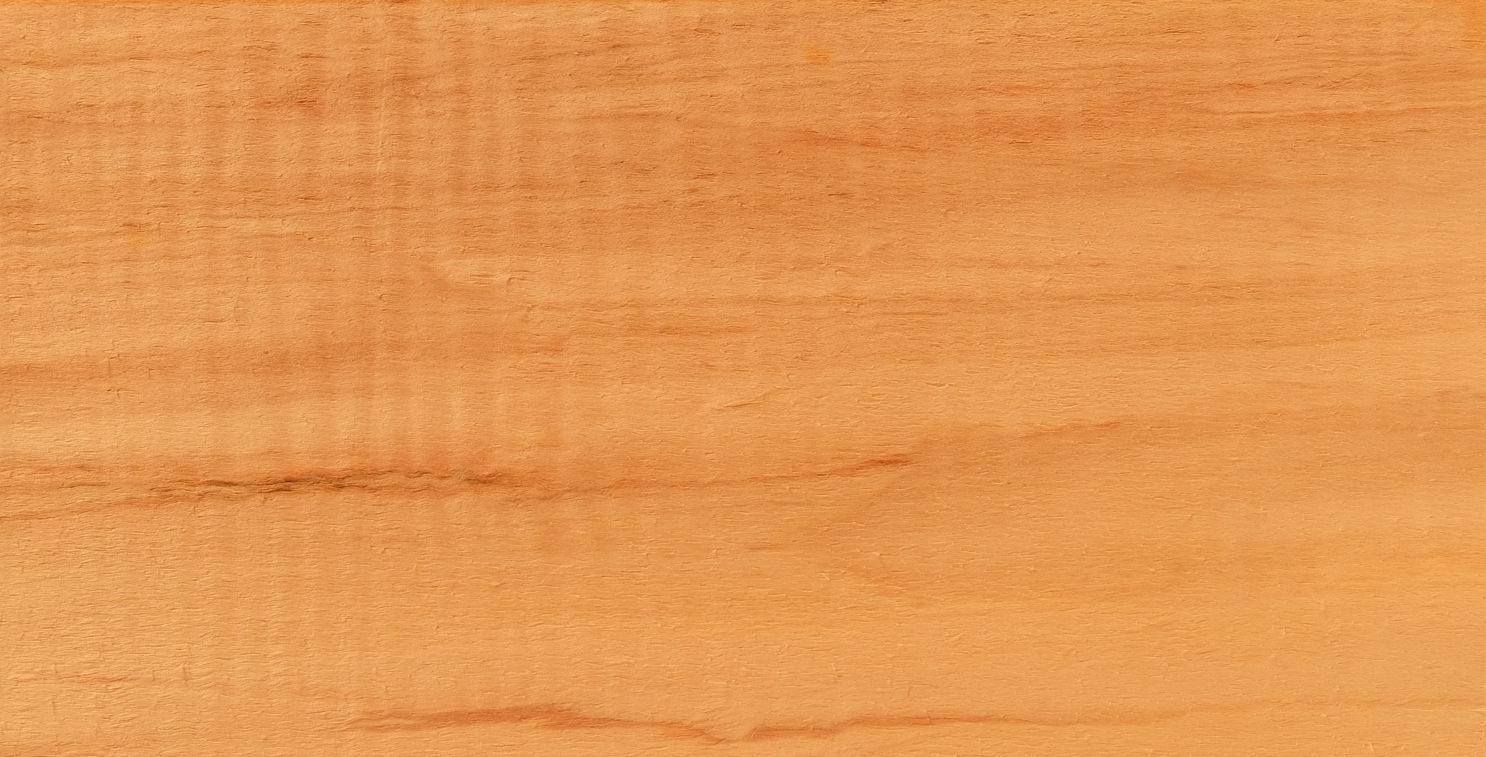 Gemessertes Furnier; Holzart: KA, Rosskastanie, Wilde Kastanie